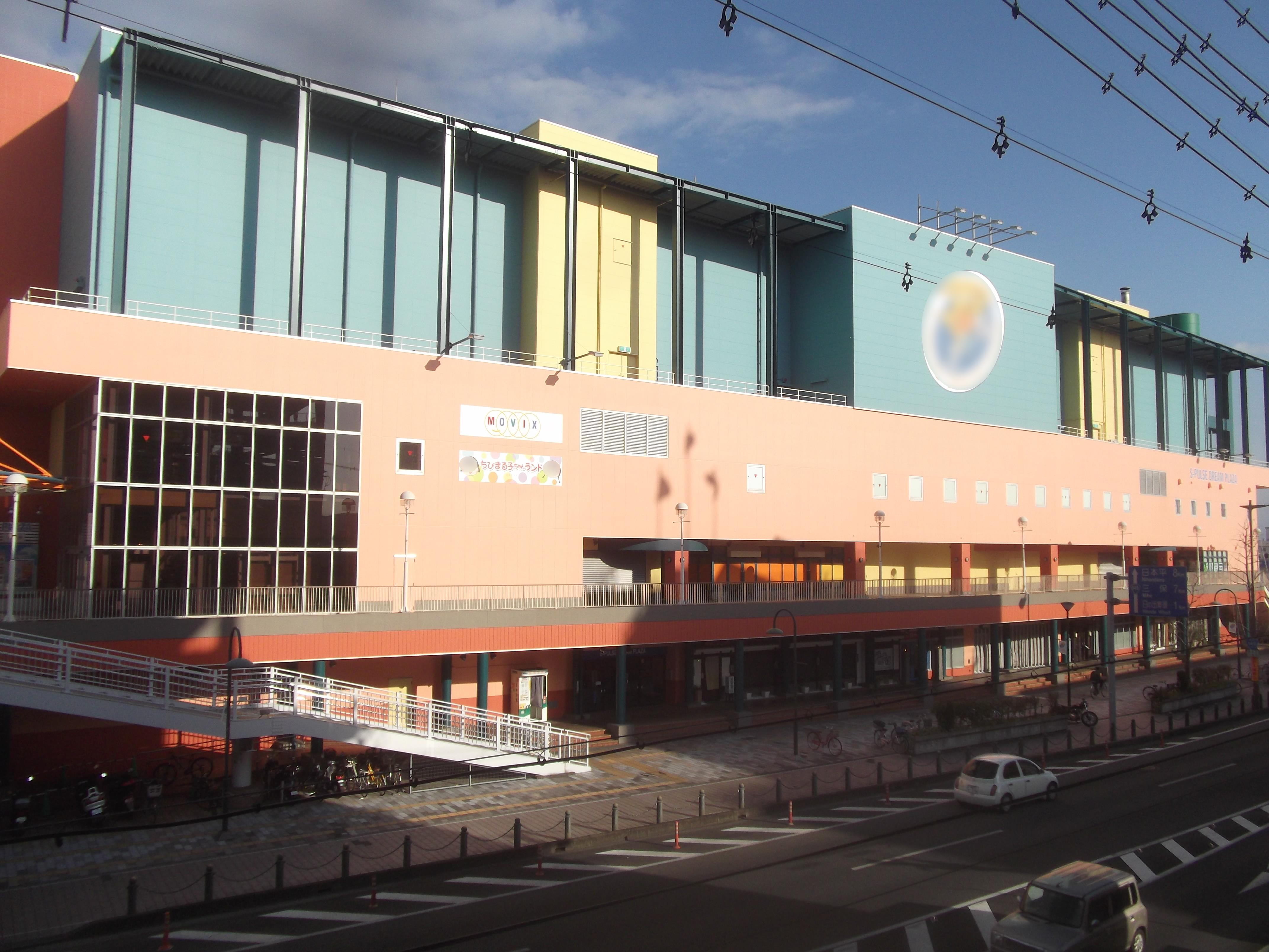 エスパルスドリームプラザ。西側から撮影。